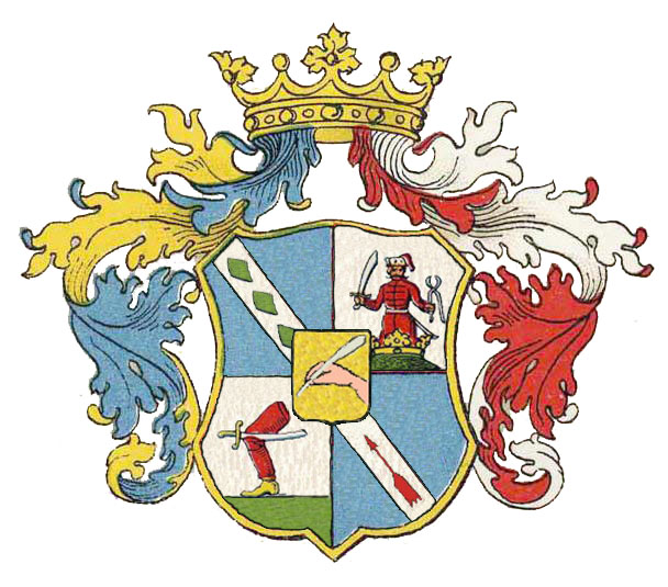 A benáthfalvi Bernáth család 1803-as címerének egy változata